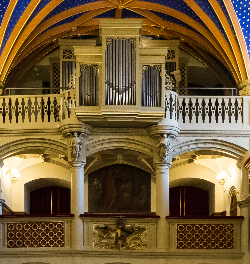 Das Schweriner Schloss im Herbst 2015